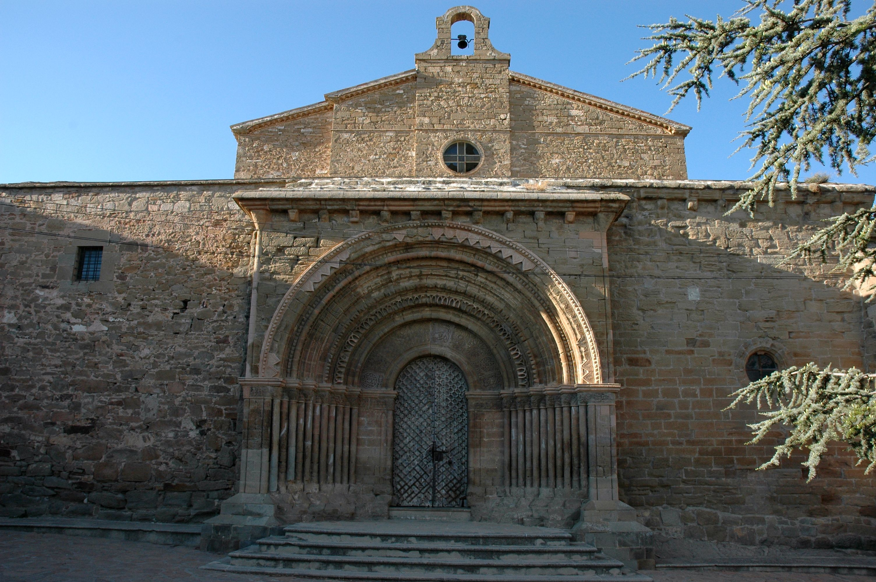 Santa Maria del Castell de Cubells